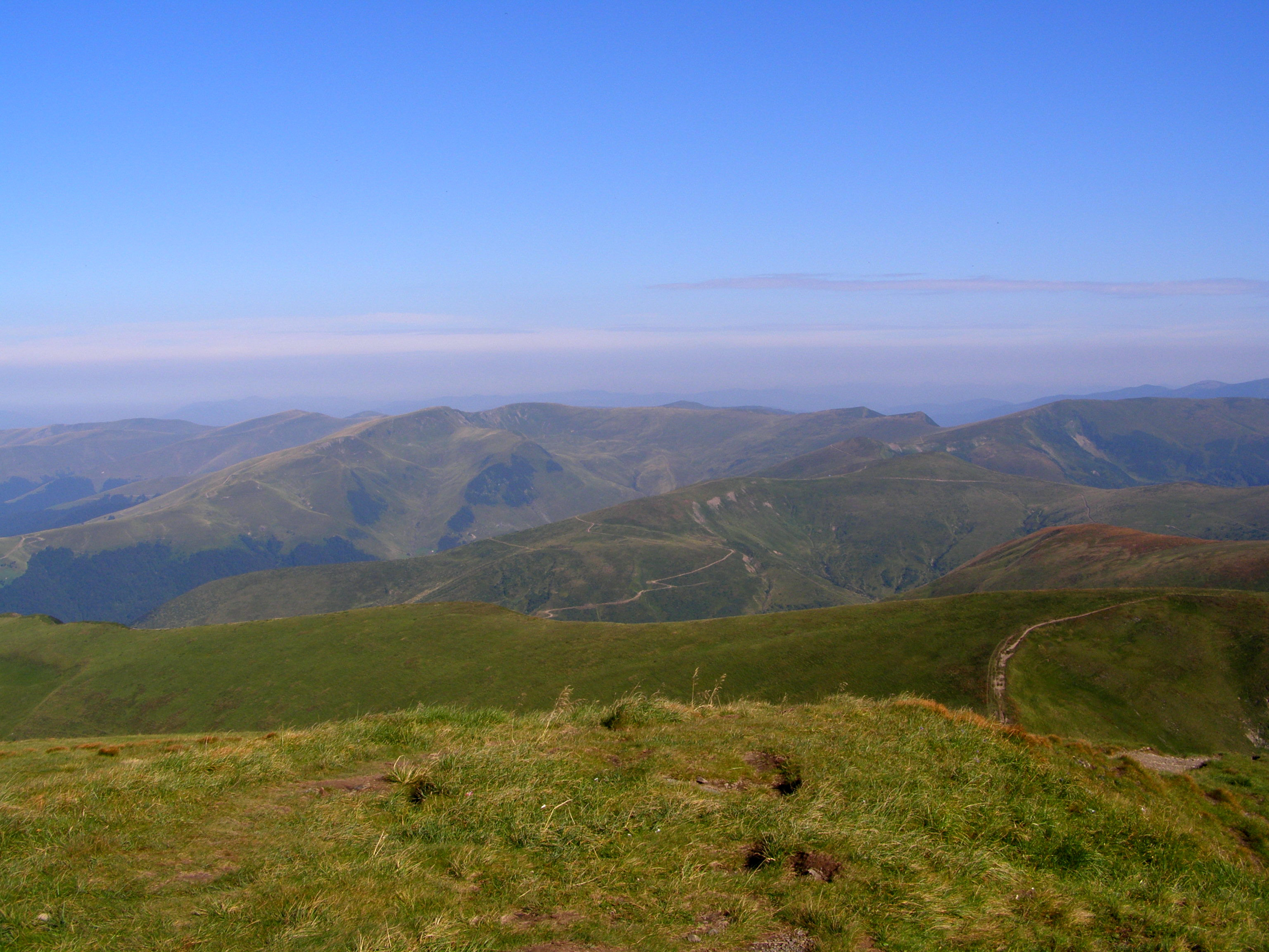 Svydovec, pohled z vrcholu Blyznycja (1881 m, nejvyšší hora pohoří) na sever, uprostřed vrchol Dohjaska (1761 m)